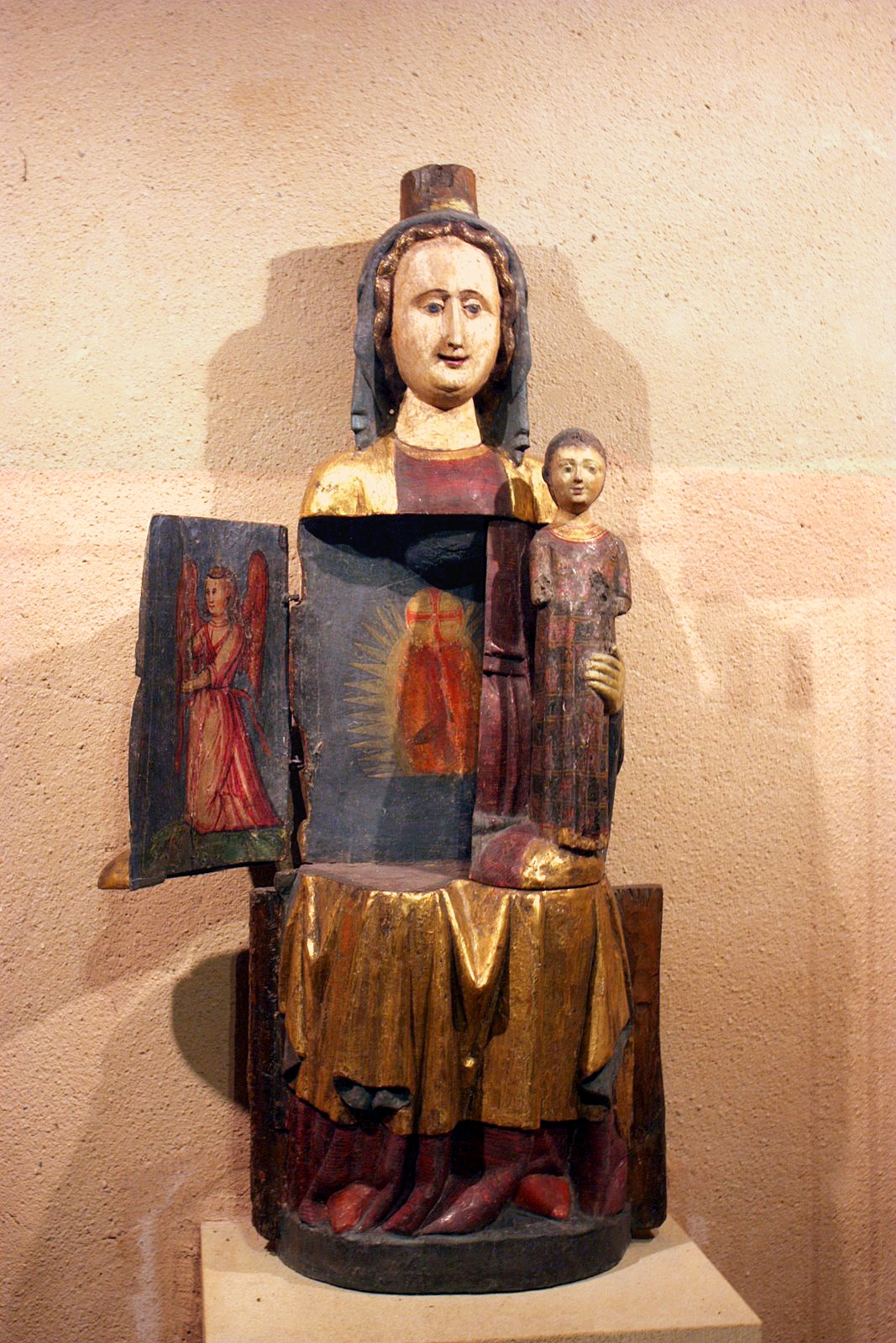 On a passé pas mal de temps à chercher cette « Vierge ouvrante en bois polychrome »...